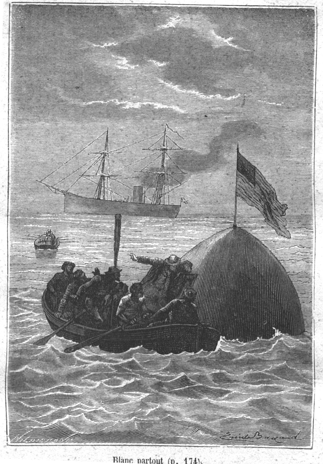 Blanc partout (p. 174). De la Terre à la Lune, Jules Verne.